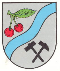 Wappen von Dittweiler